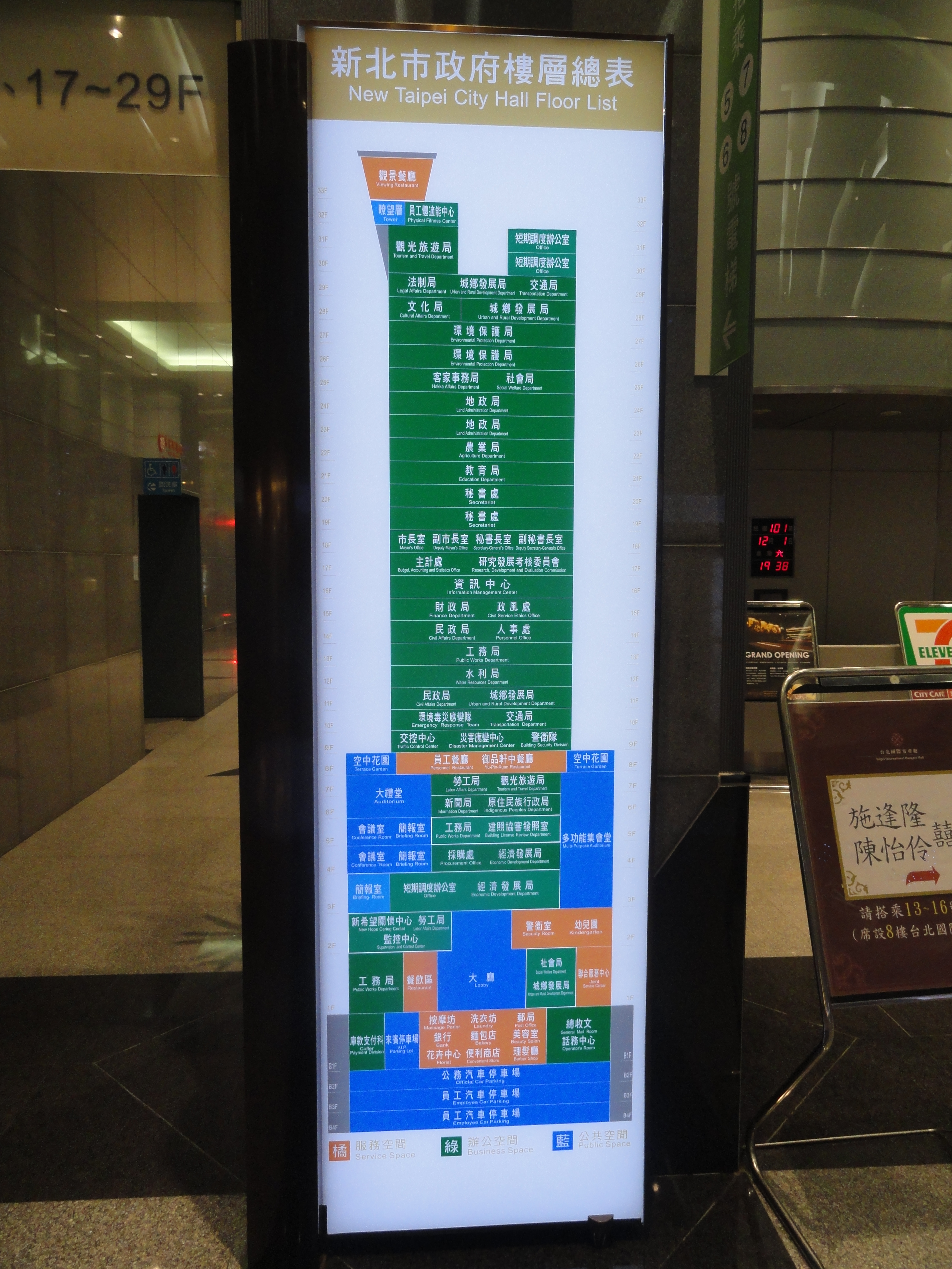 新北市政府樓層總表。